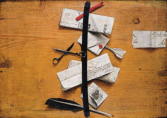 Jean-François De le Motte (1625-1685). Trompe-l'œil, huile sur toile (1667) de Jean-François de Le Motte. (Musée des Beaux-Arts, Arras.)